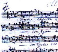 Johann Sebastian Bach pflegte seine Werke mit J.J. ("Jesus hilf!") zu überschreiben, dies ist eine Illustration seiner Gewohnheit.